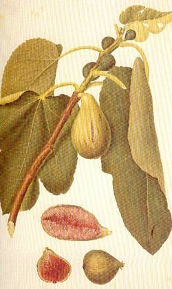 planche botanique de figues, variété "couille du pape"